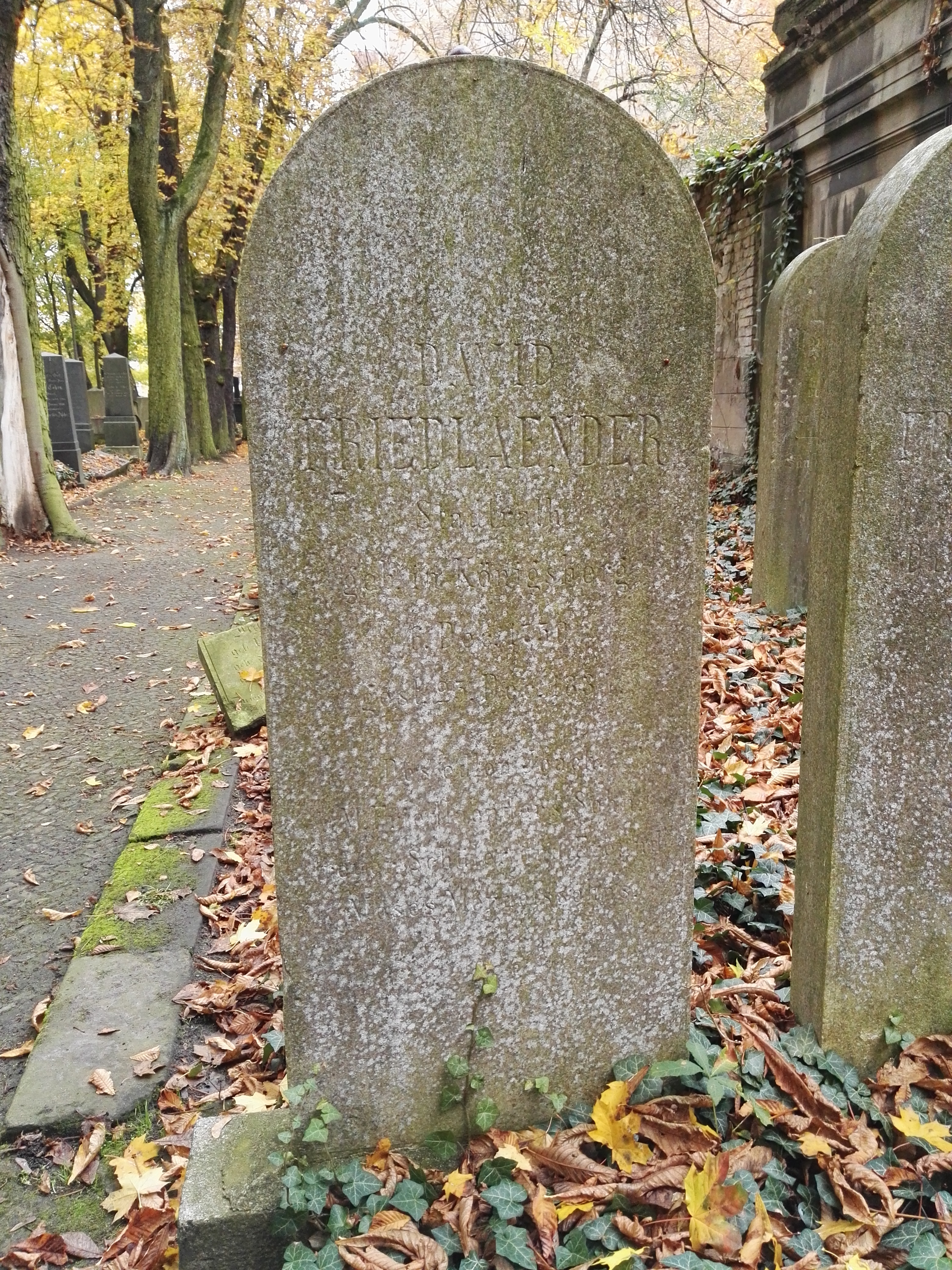 Grab von David Friedländer auf dem Jüdischer Friedhof Schönhauser Allee in Berlin-Prenzlauer Berg